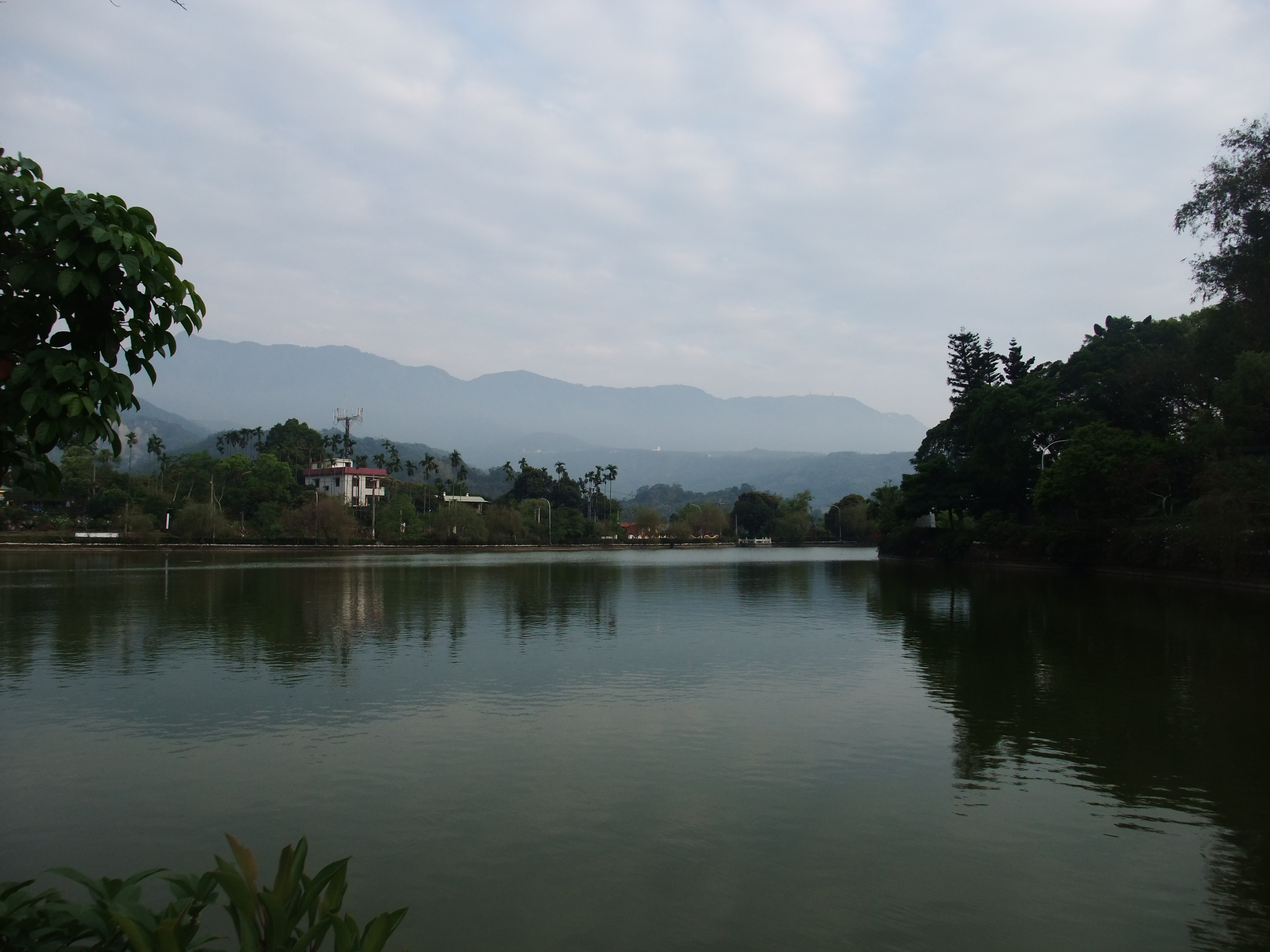 雲林縣古坑鄉劍湖一景